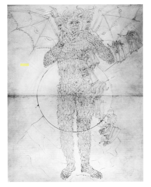 Botticelli's Lucifer from Inferno XXXIV